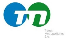 Logo empresa metrotren